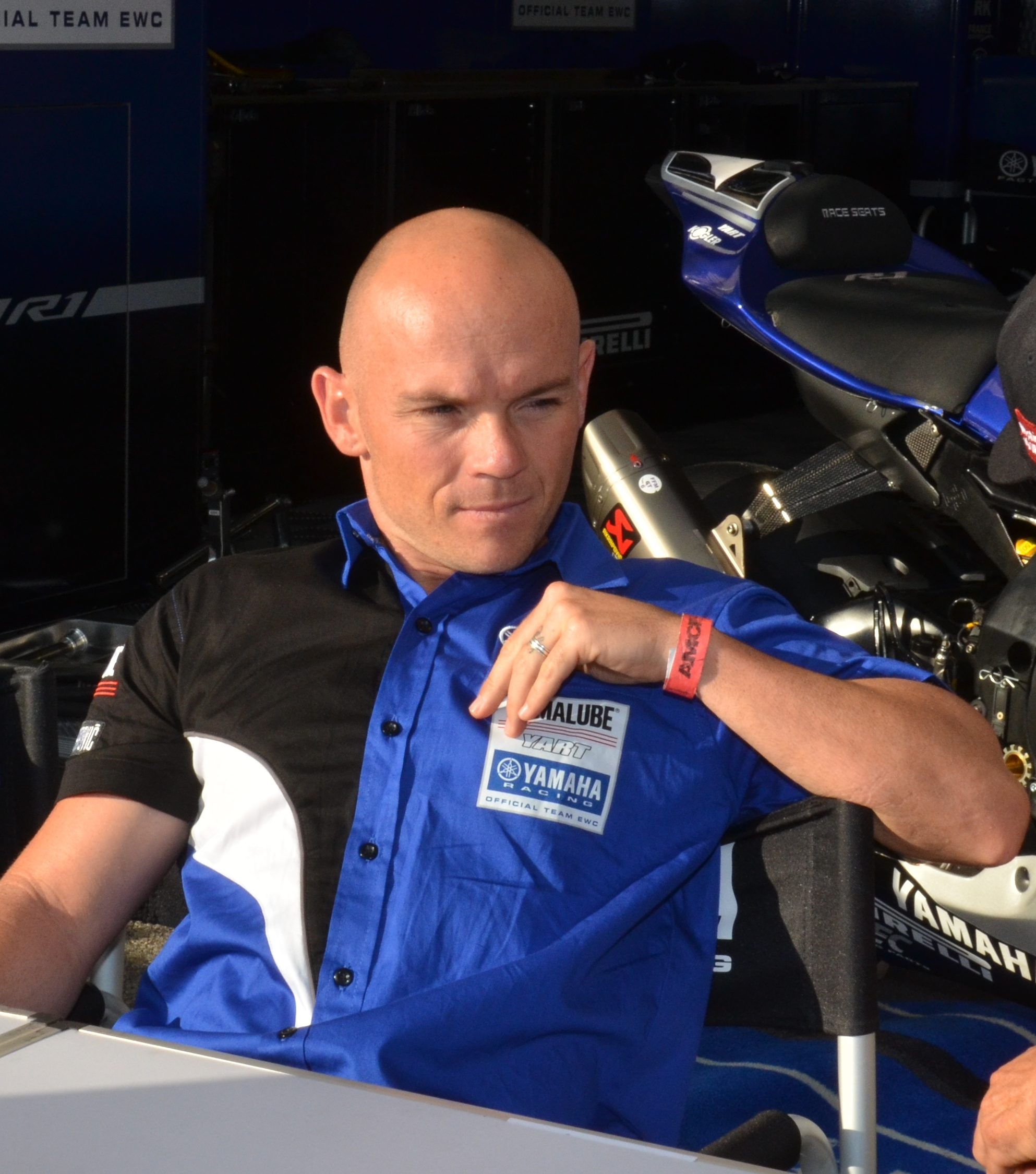 Sheridan Morais lors du Bol d'Or 2016